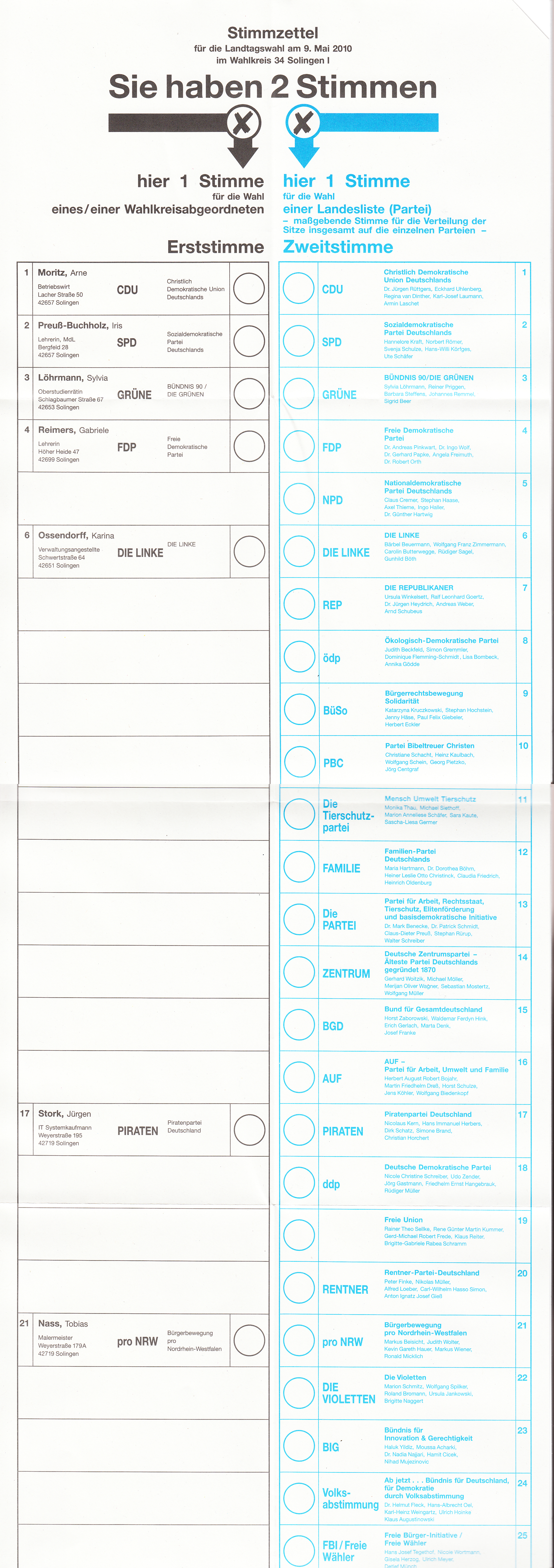 Stimmzettel für die Landtagswahl in NRW am 09.05.2010, Wahlkreis 34 Solingen I